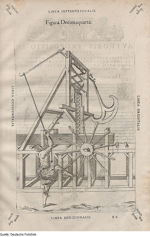 Original image description from the Deutsche Fotothek Mechanik & Säge & Holz